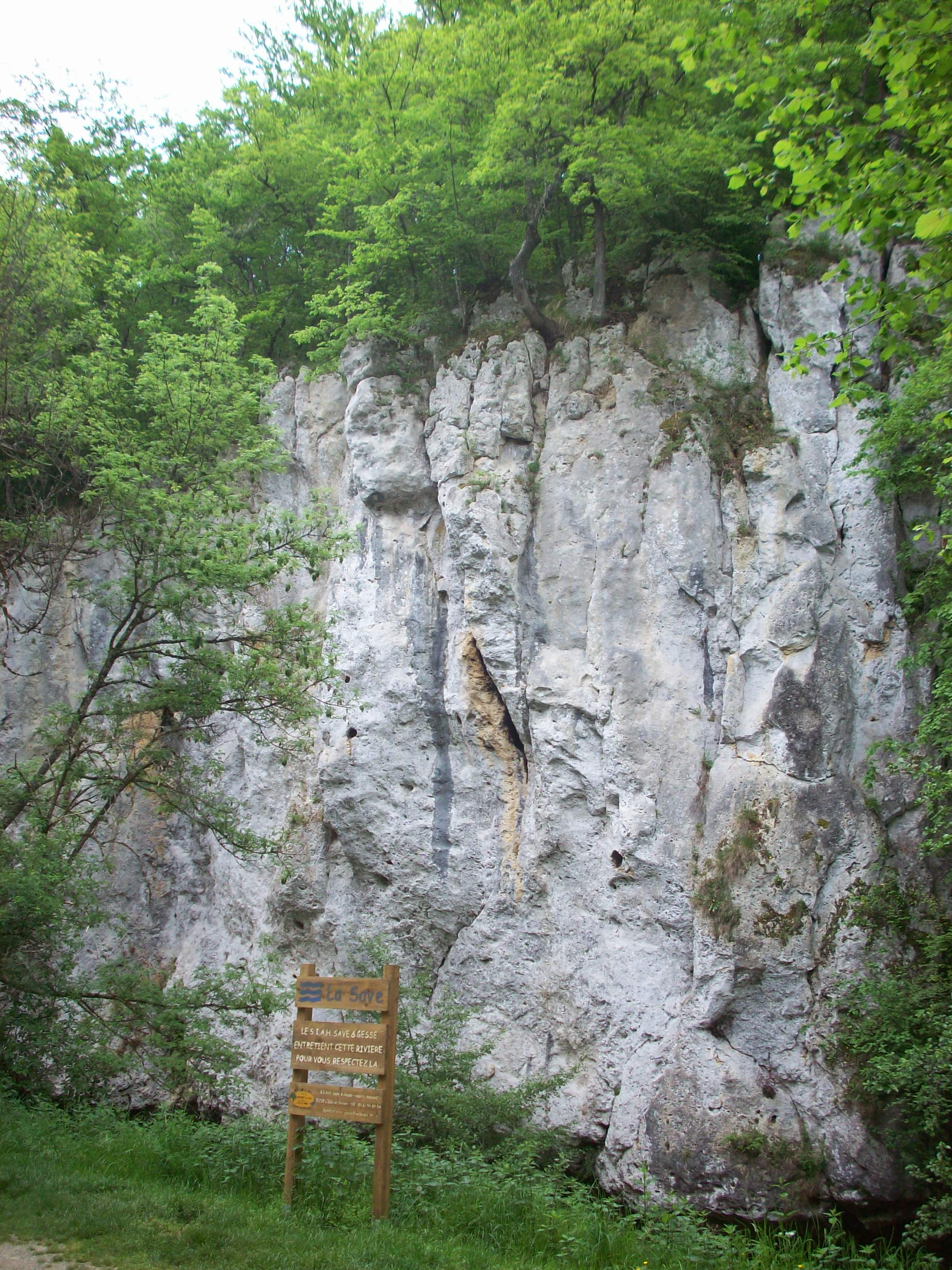 Gorges de la Save (Haute-Garonne, France)